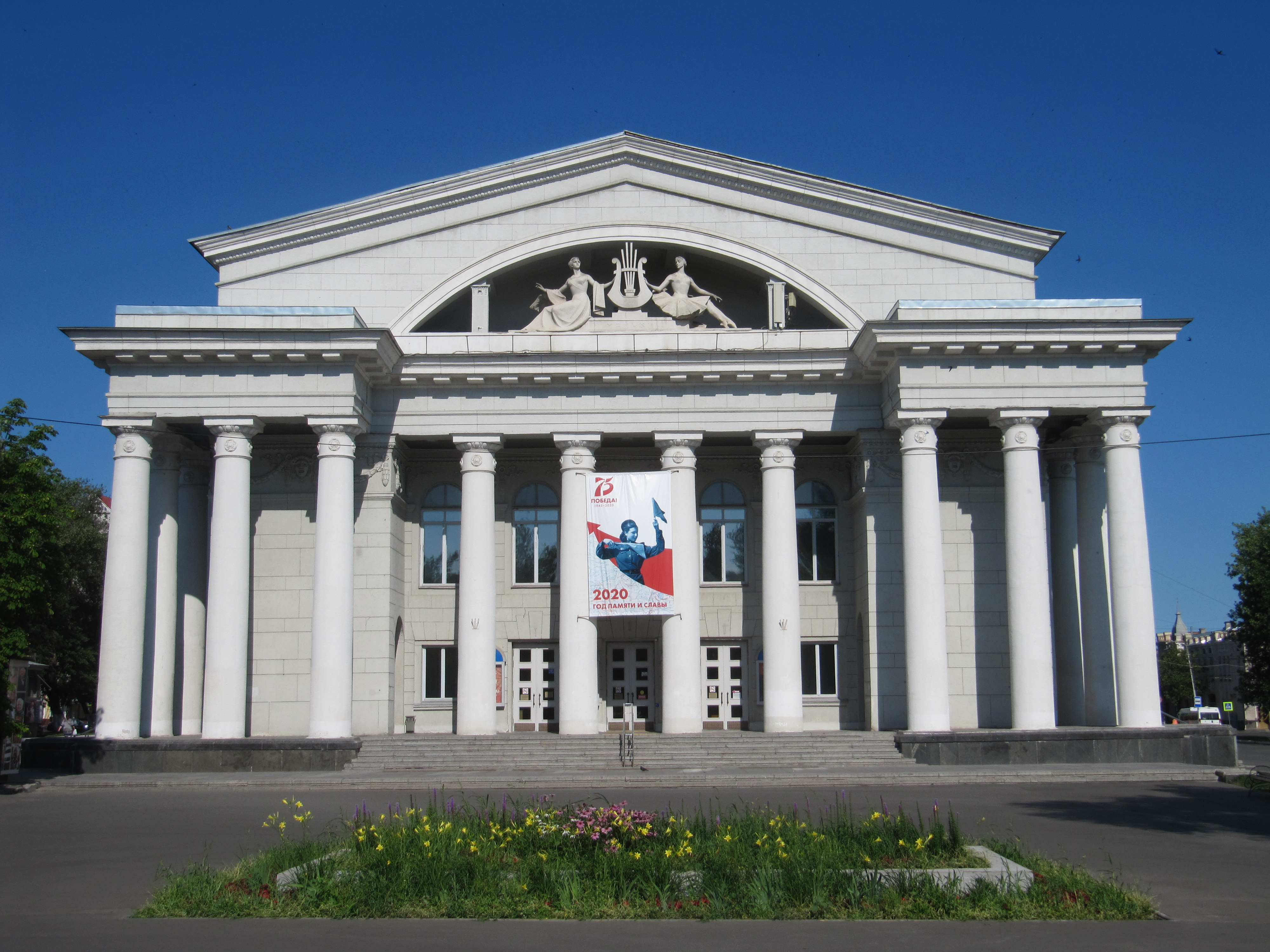 Театр оперы и балета, Театральная площадь, Саратов